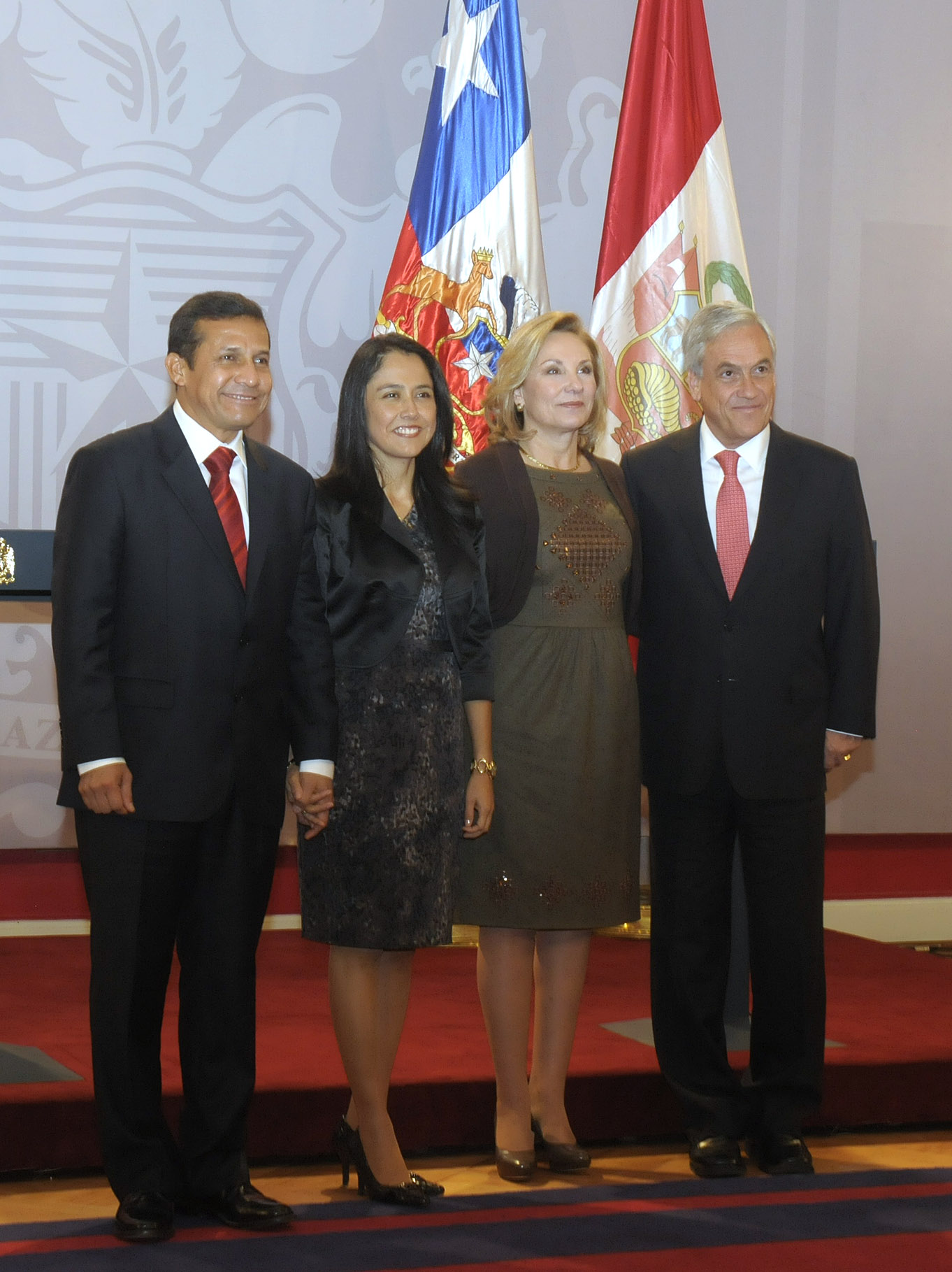 15.06.2011 El Presidente de la República, Sebastián Piñera y el Mandatario electo de Perú, Ollanta Humala, ofrecen una declaración a la prensa.